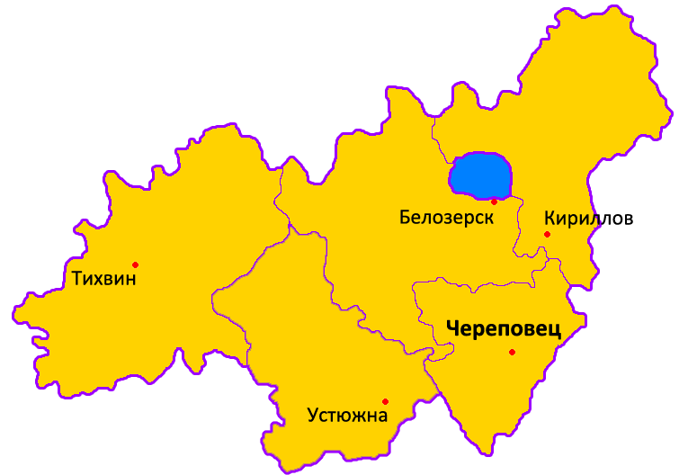 Череповецка губ. 1918